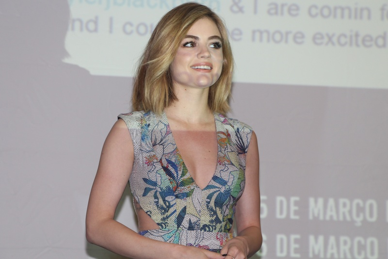 Lucy Hale-001